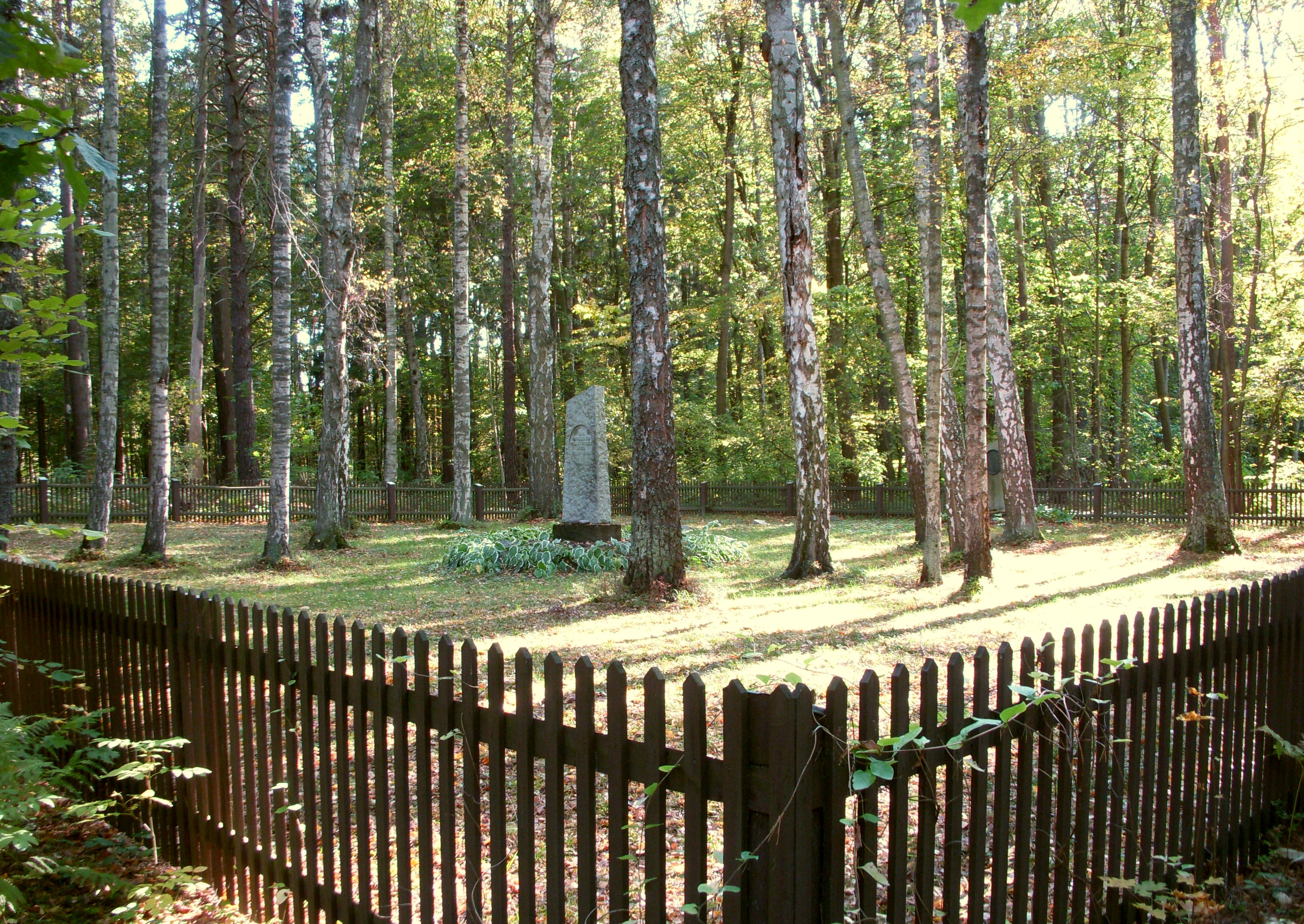 Invalidkyrkokården, Ulriksdal